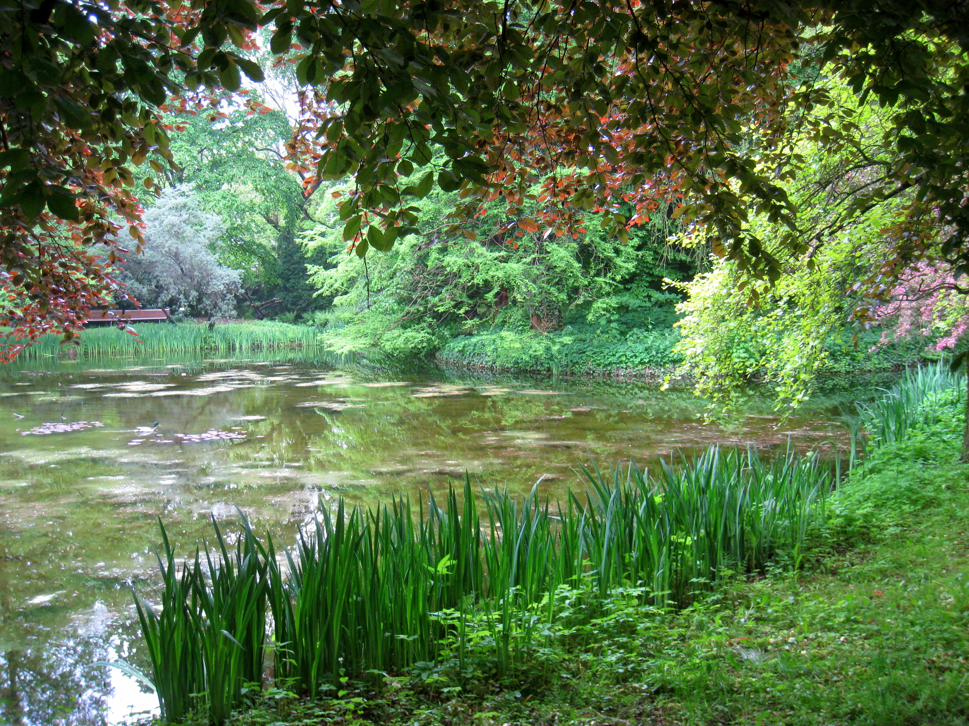 Späth-Arboretum, Berlin, Germany.